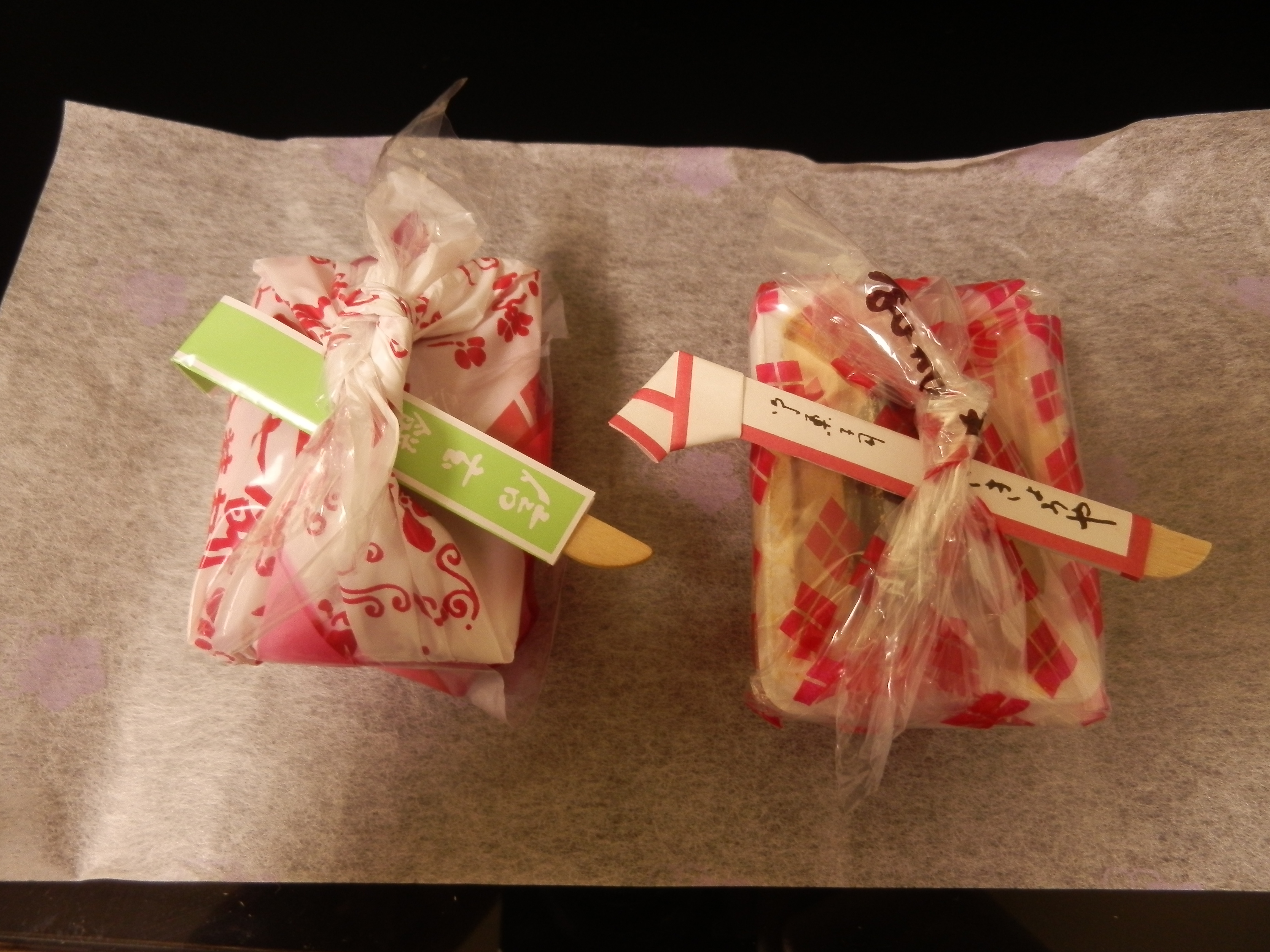 信玄餅（左）と桔梗信玄餅（右）の比較